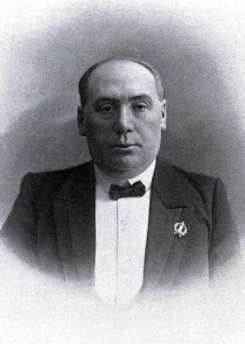 Роскин, Иосиф Григорьевич